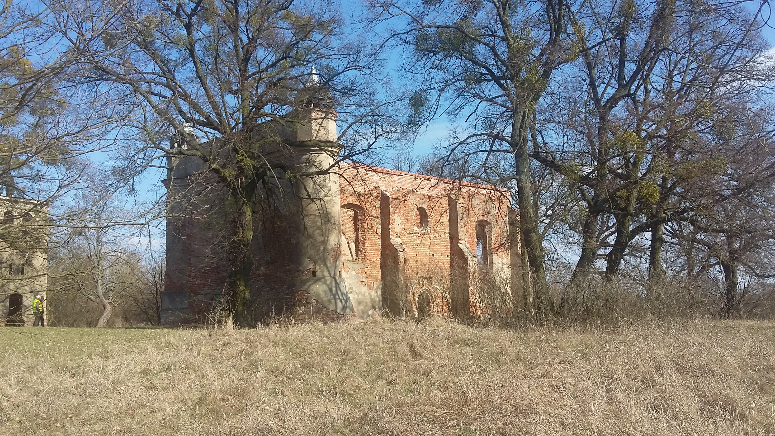 28-03-2016 Kościół w Chojnicy